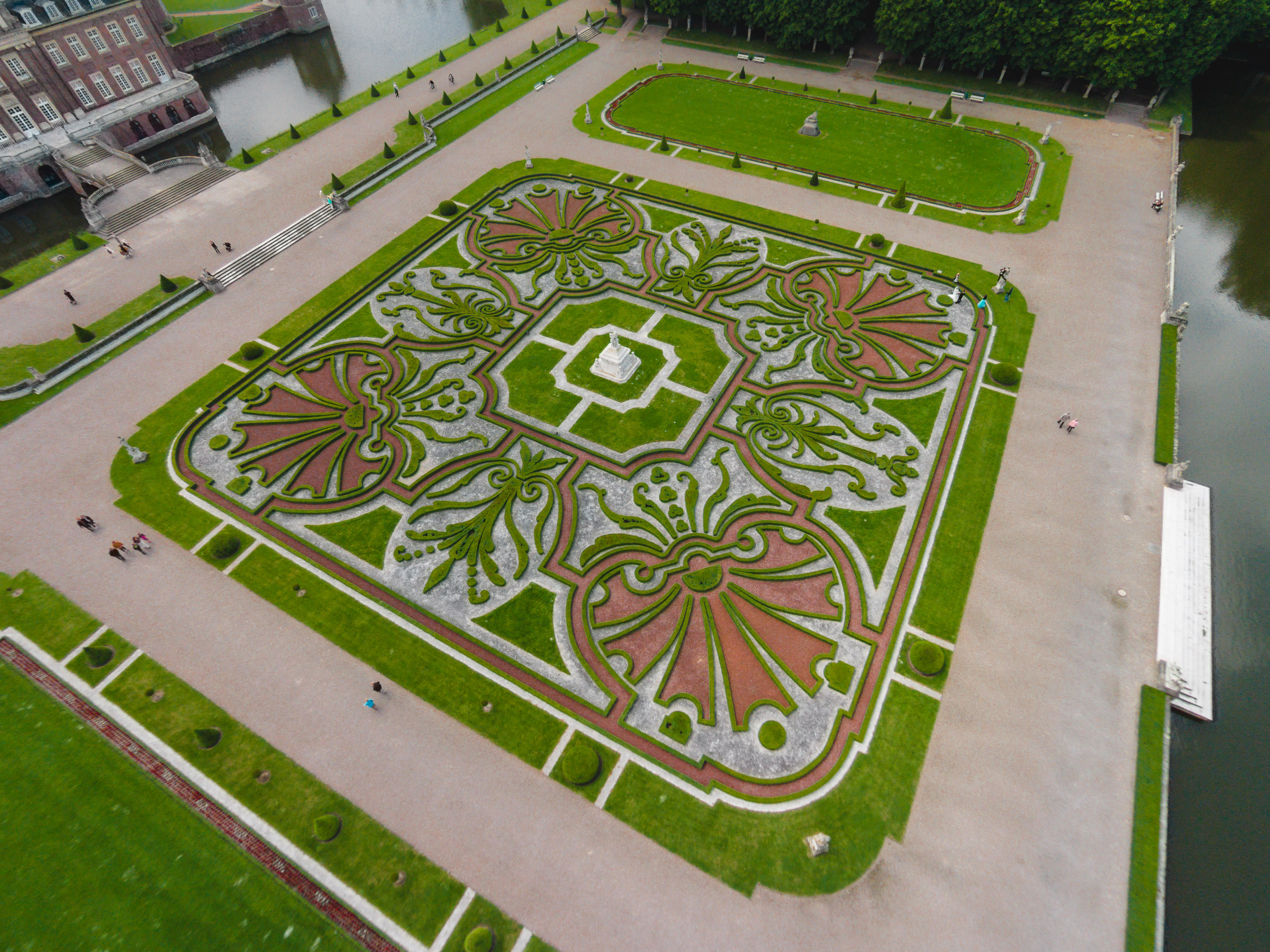 Schloss Nordkirchen und Anlage in NRW aus der Luftperspektive